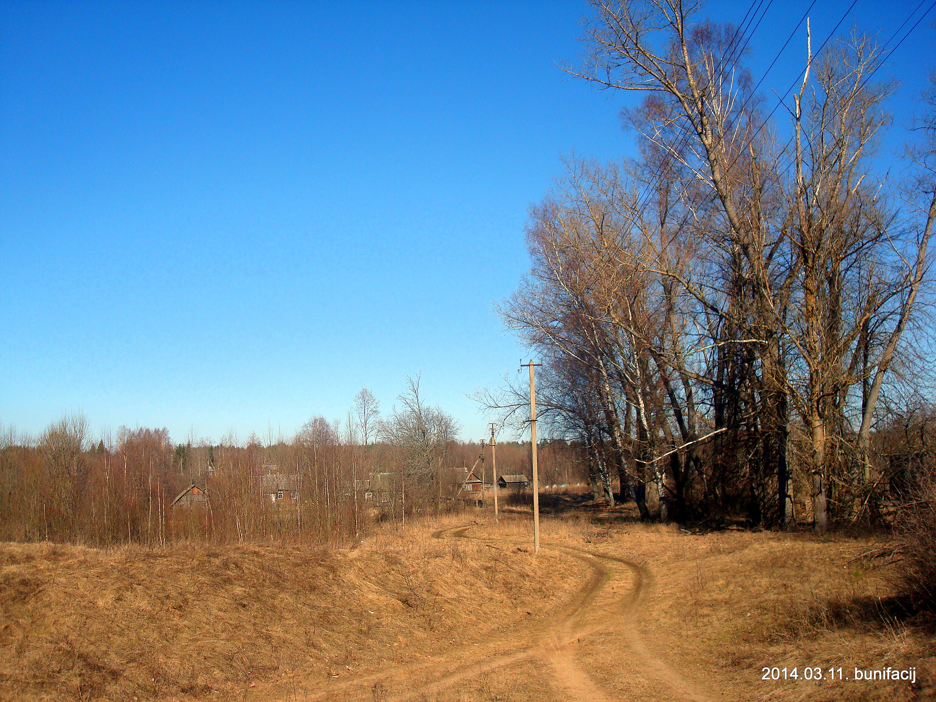 Вид от церкви